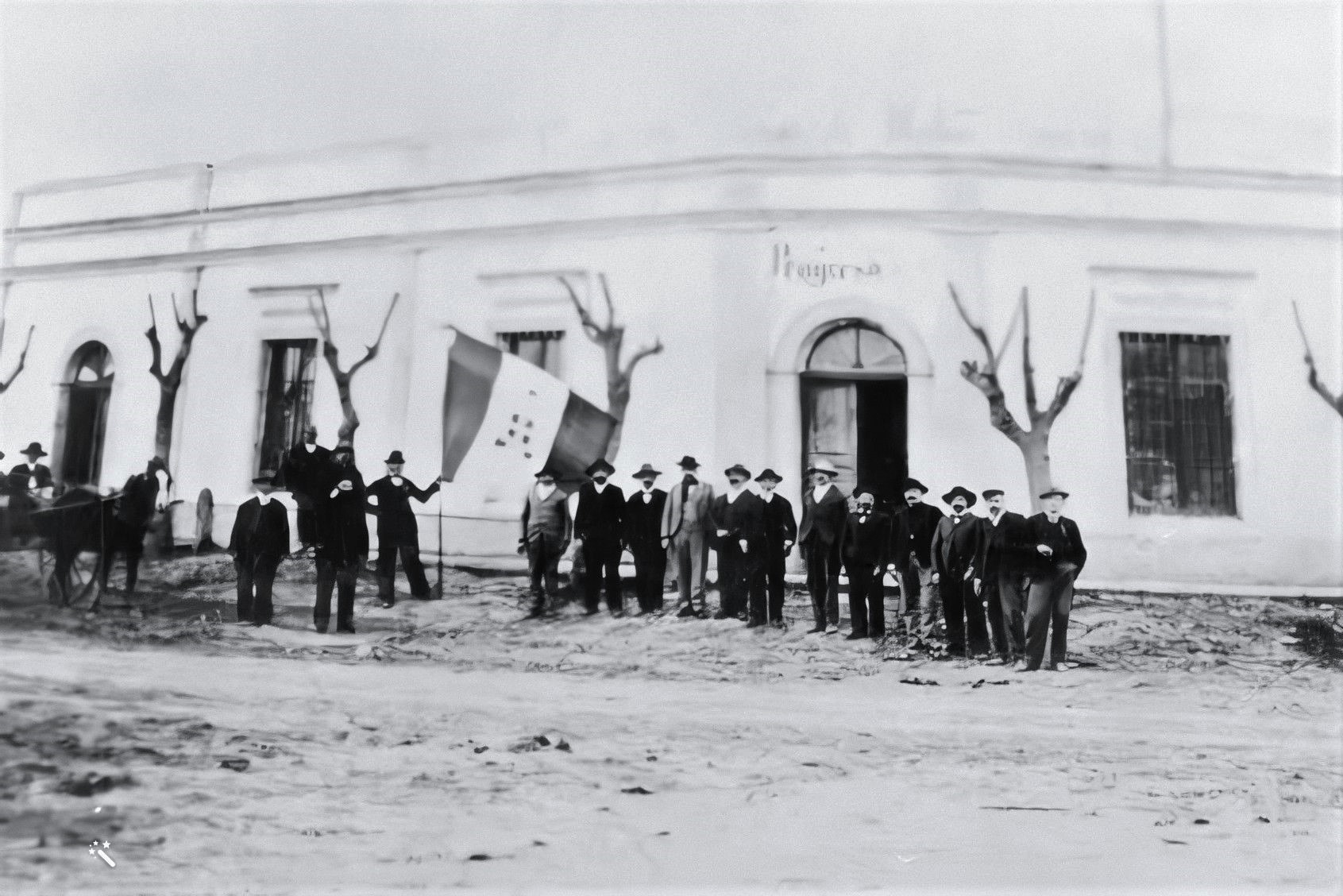 Ilustración de establecimiento con fines sociales